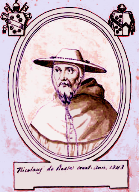 Cardinal Nicolas de Besse